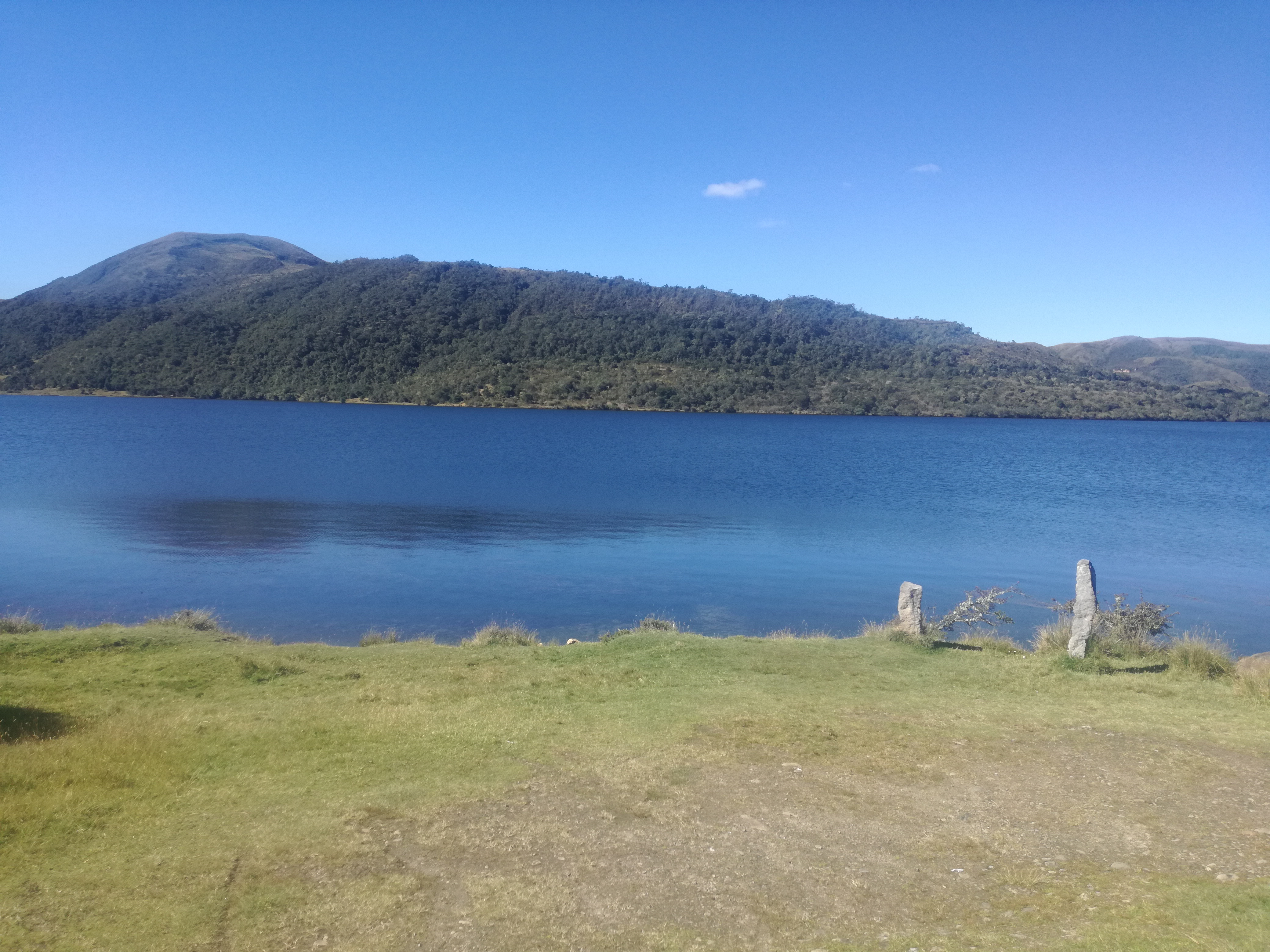 Se puede observar la laguna de Chingaza,hace parte del parque nacional natural Chingaza en la region andina de colombia y esta ubicada entre los departamentos de cundinamarca y meta. Esta fotografía fue tomada en el municipio colombiano con código 251648.